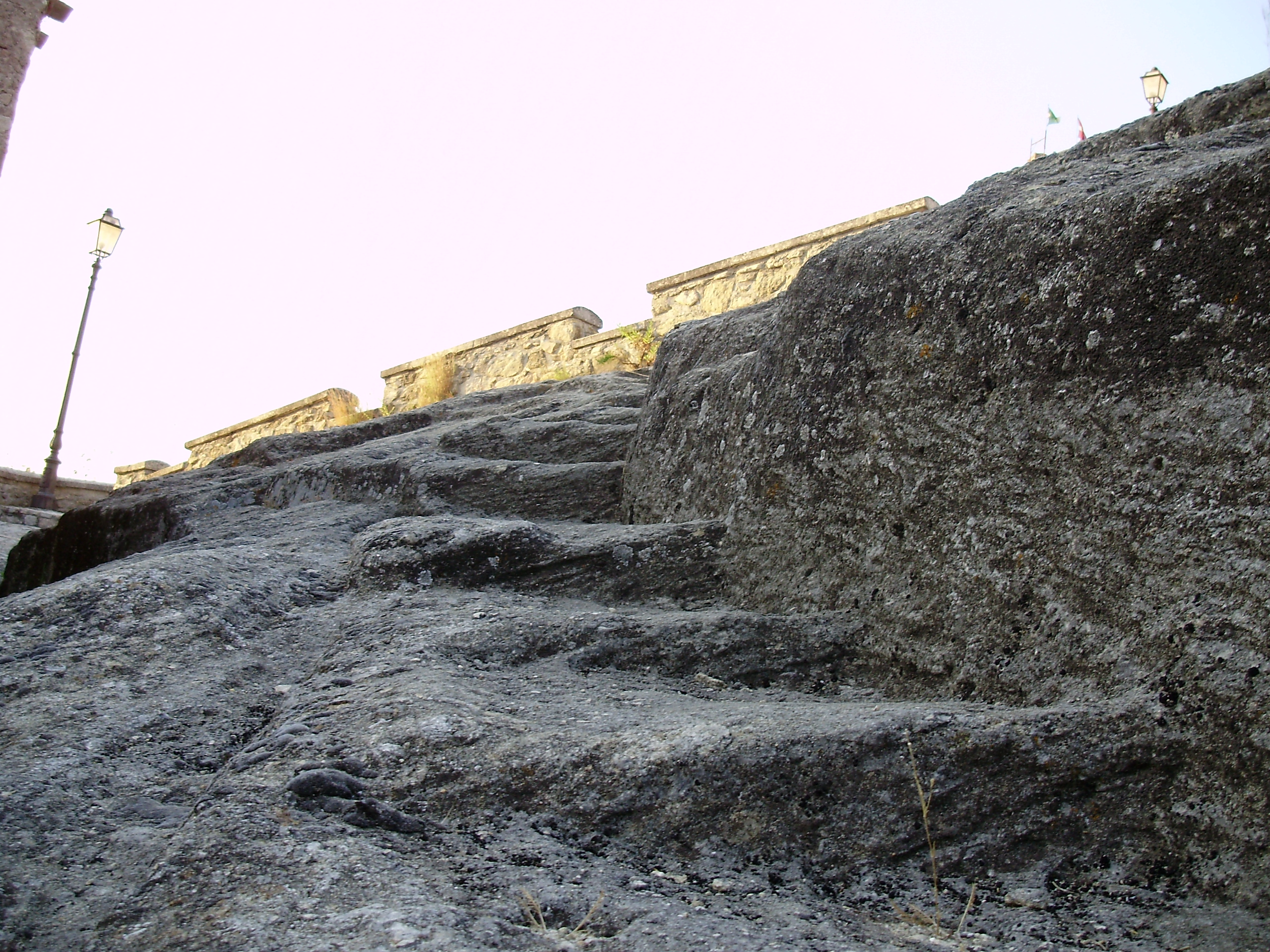 Cleto, la scalinata che conduce al castello.